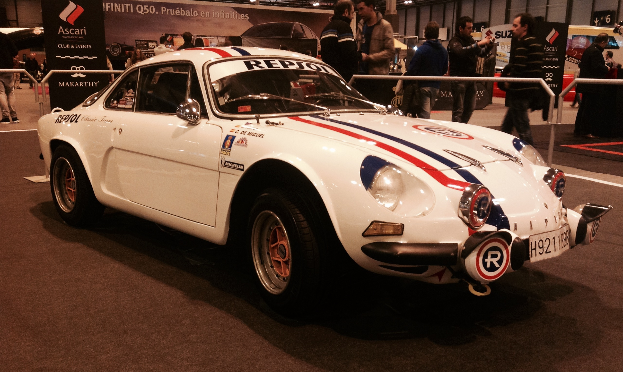 Renault Alpine A110 (Carlos de Miguel)